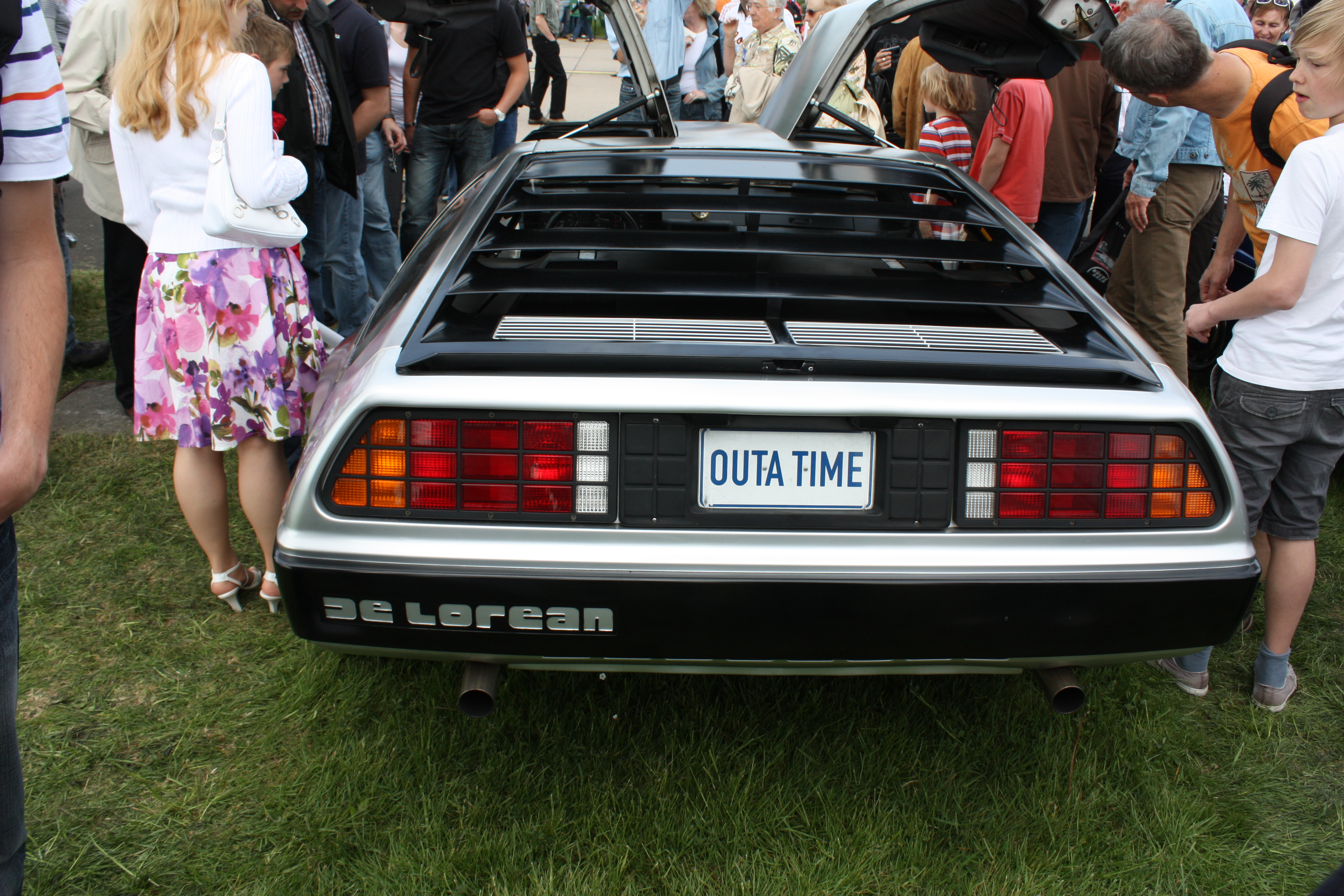 Vintage cars at Bremen Airport Flugtag 2009; Oldtimer